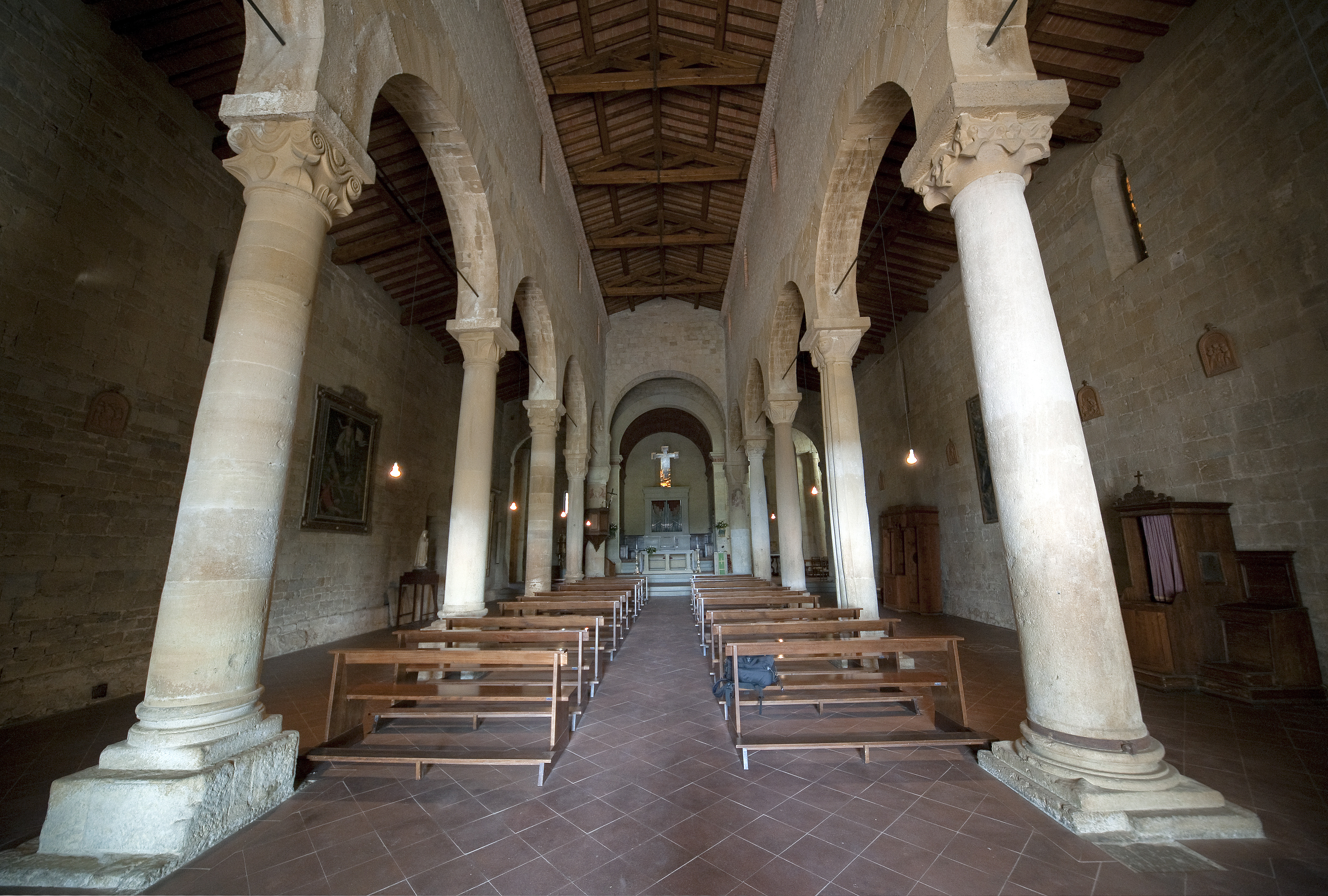 Interno della Pieve di Santa Maria Assunta a Chianni, Gambassi Terme